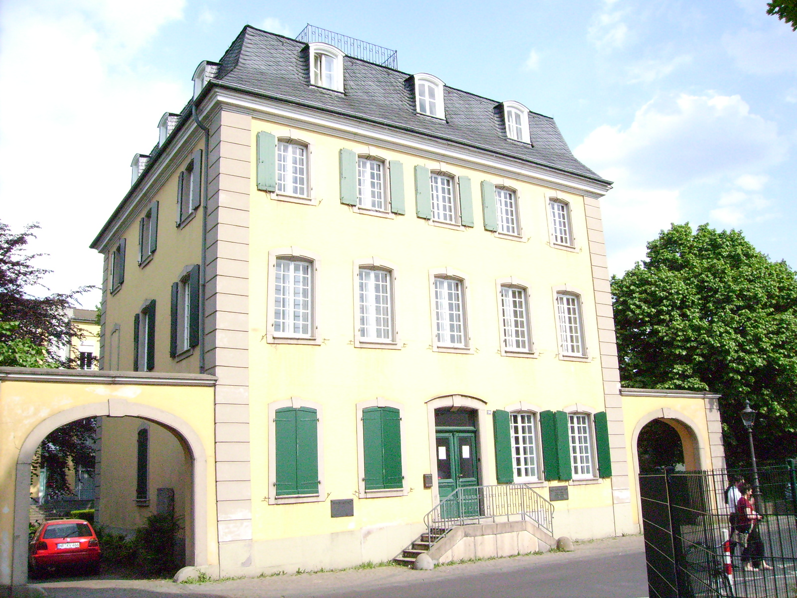 Bildbeschreibung: Haus Mehlem in Bonn-Beuel Quelle: selbst erstellt Fotograf/Zeichner: Peter Pittelkow Datum: 2006